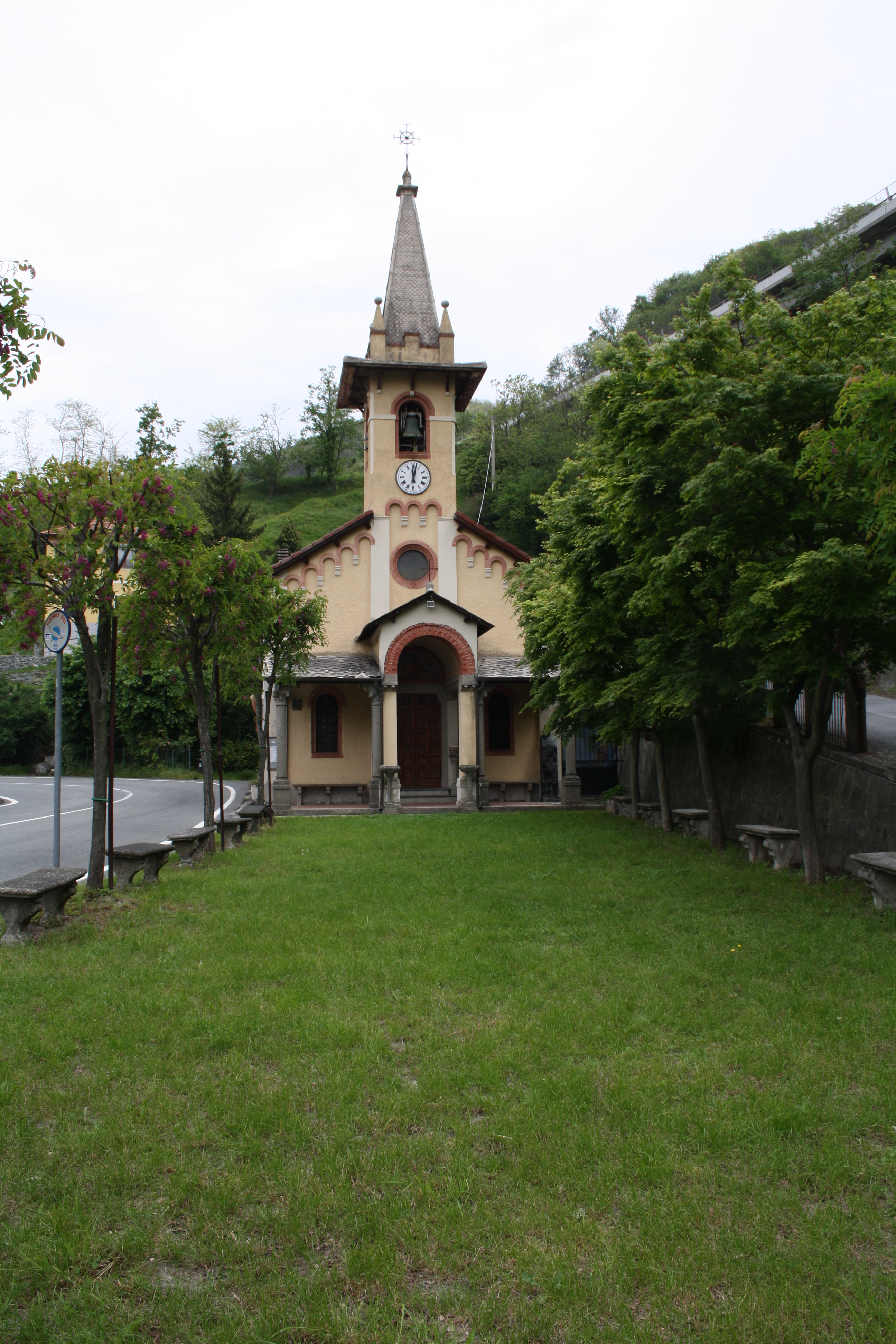 Chiesa di San Giacomo Maggiore, al Fado, frazione di Mele (GE)